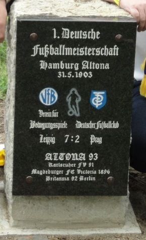 Der zweite von 6 Pilgersteinen, aufgestellt am 5. August 2012 im Leipziger VfB-Stadion.